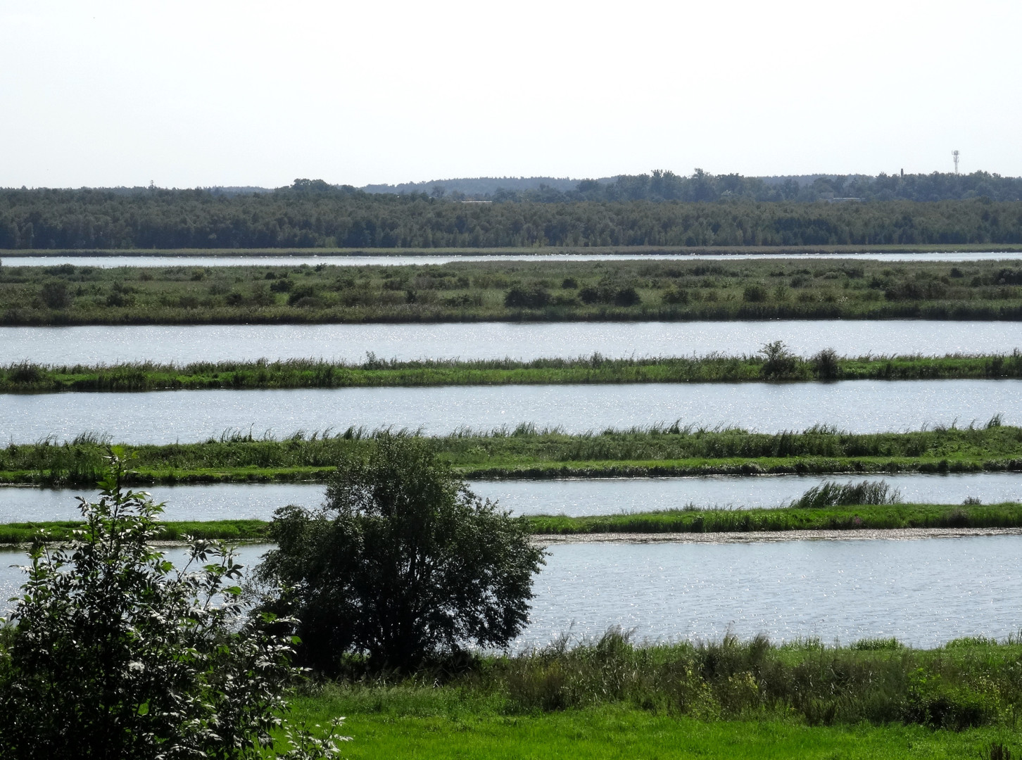 Widok ze Ślesina na dolinę Środkowej Noteci i Kanału Bydgsokiego